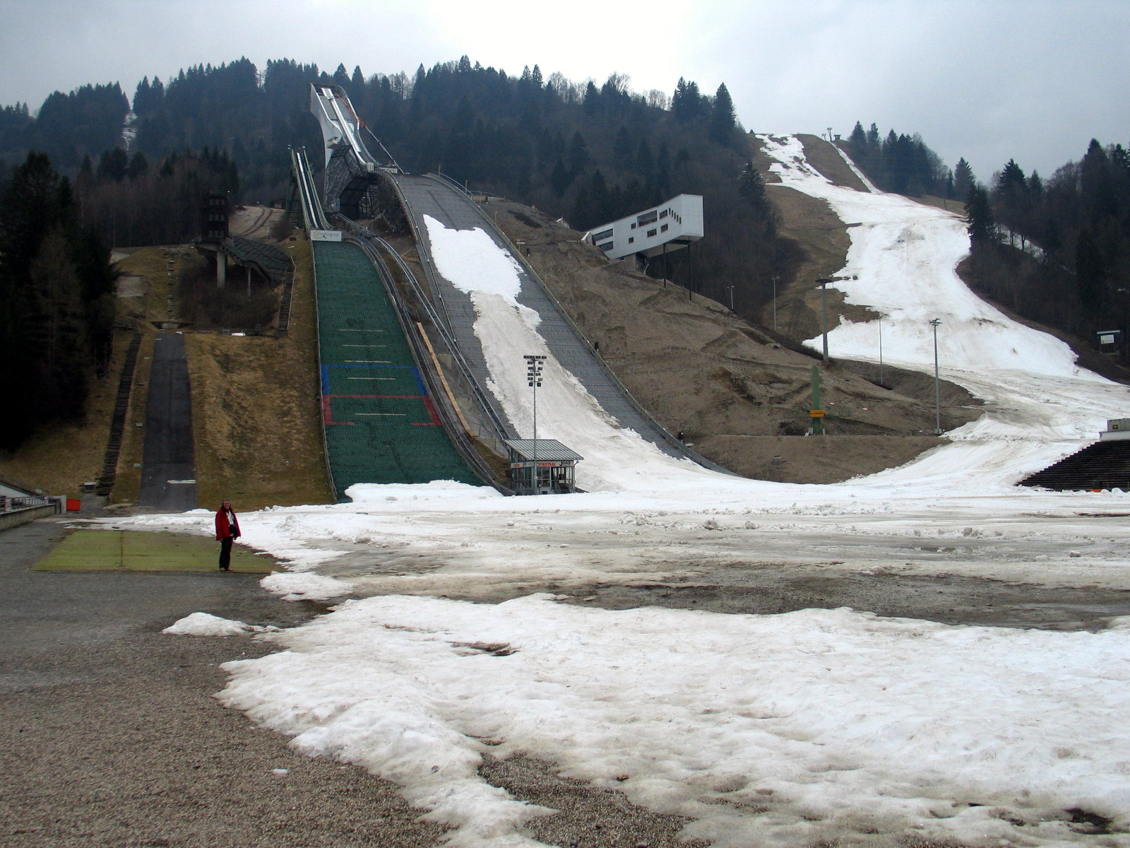 de nieuwe Olympiaschans in Garmisch-Partenkirchen